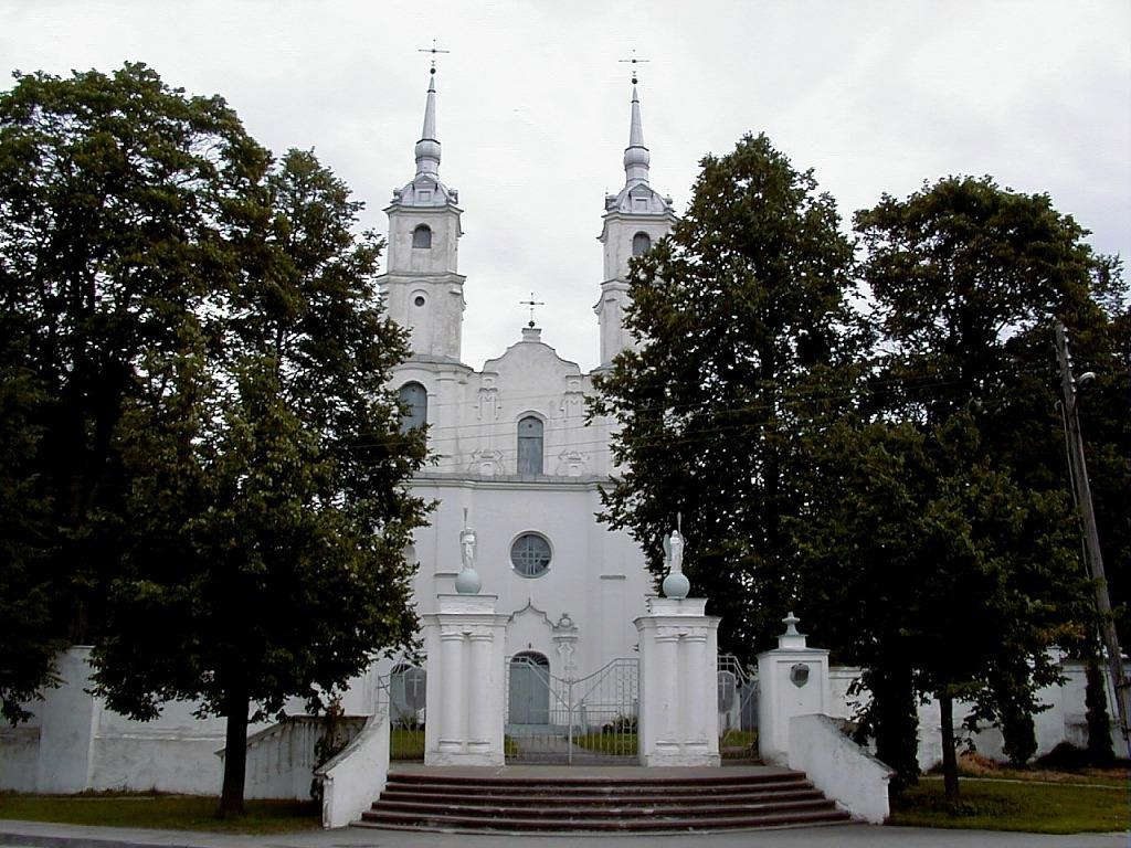 Viļānu katoļu baznīca 2000-07-22